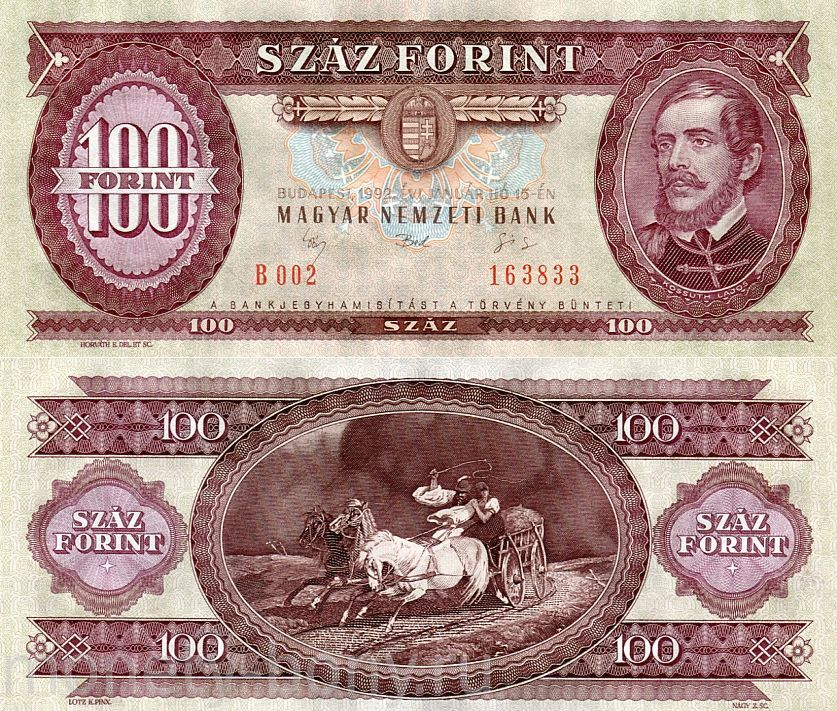 100 форинт 1984 год. Венгрия.